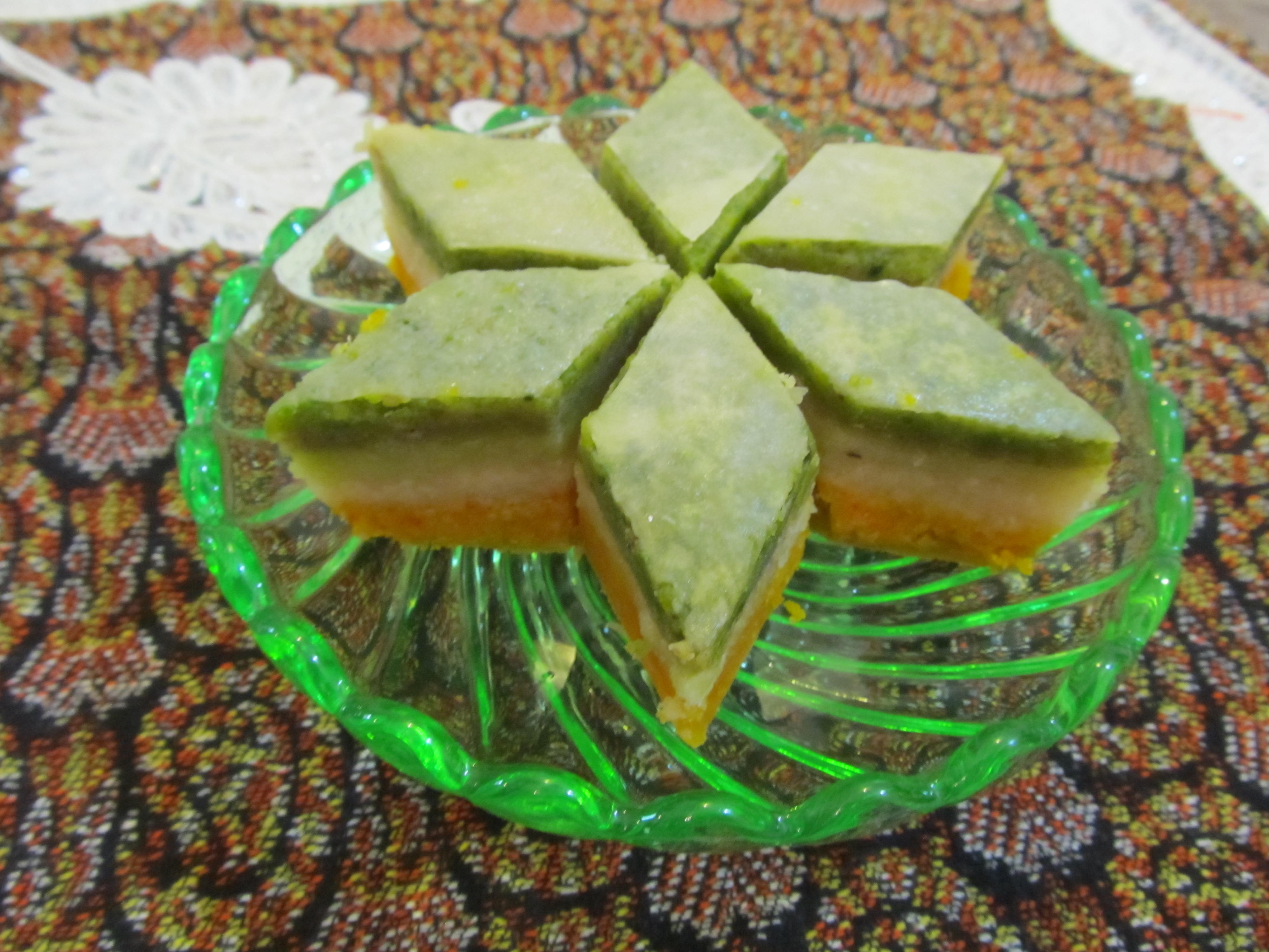 باقلوای سنتی قزوین